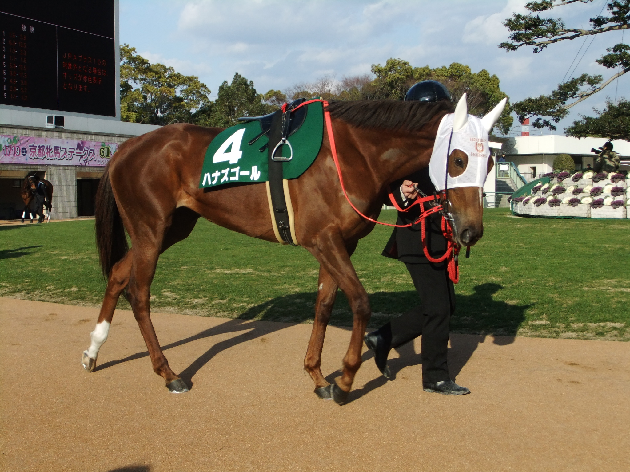 ハナズゴール 2013年1月19日 京都競馬場